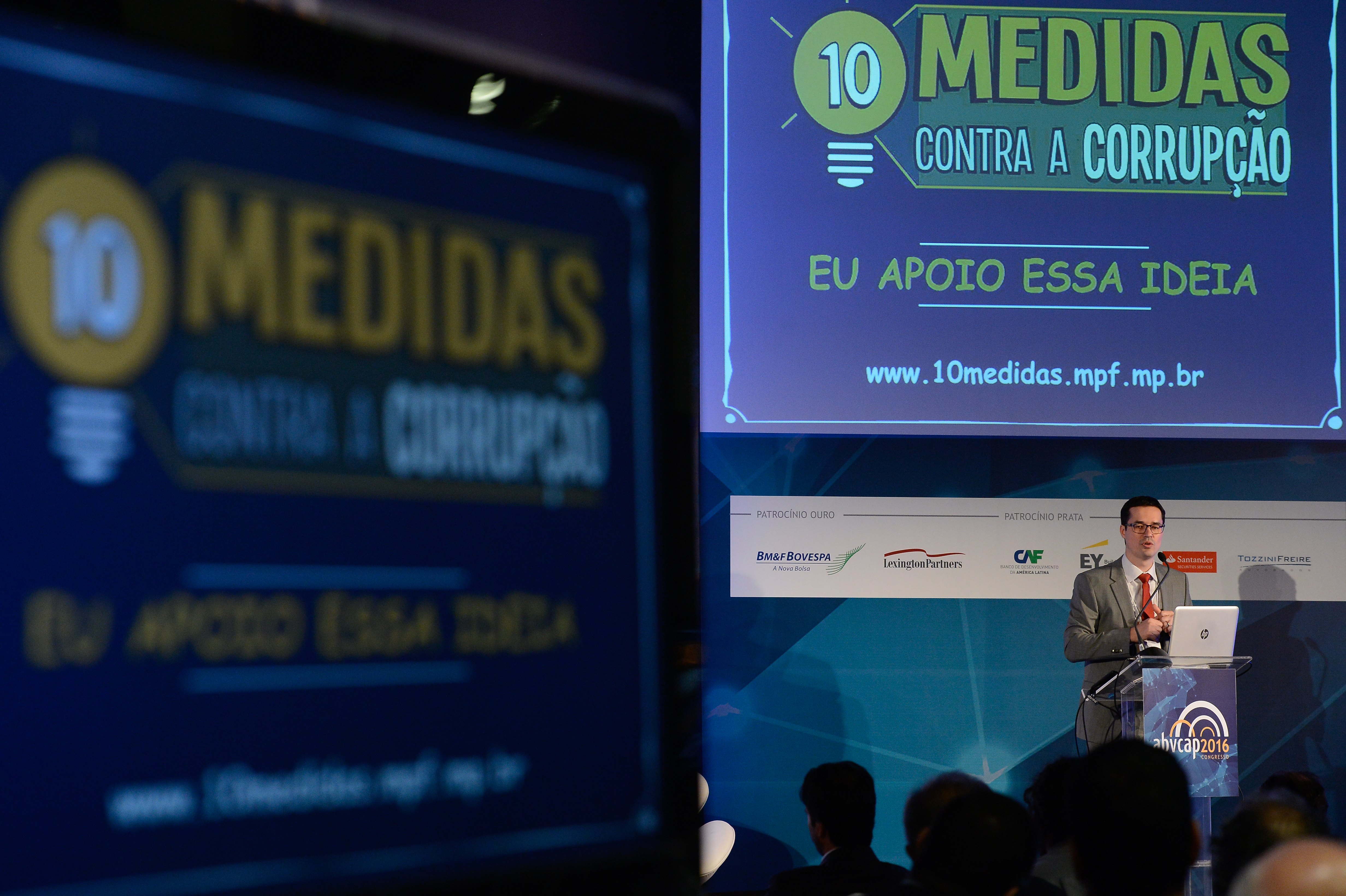 Procurador do Ministério Público Federal e coordenador da força tarefa da Operação Lava Jato, Deltan Dallagnol, fala no Congresso da Associação Brasileira de Private Equity & Venture Capital, em apoio as 10 Medidas Contra a Corrupção.